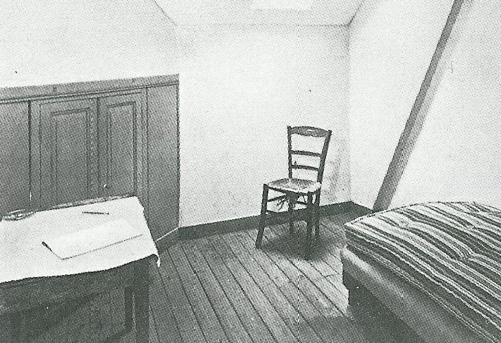 Das Sterbezimmer von Vincent van Gogh im Gasthaus Ravoux in Auvers.